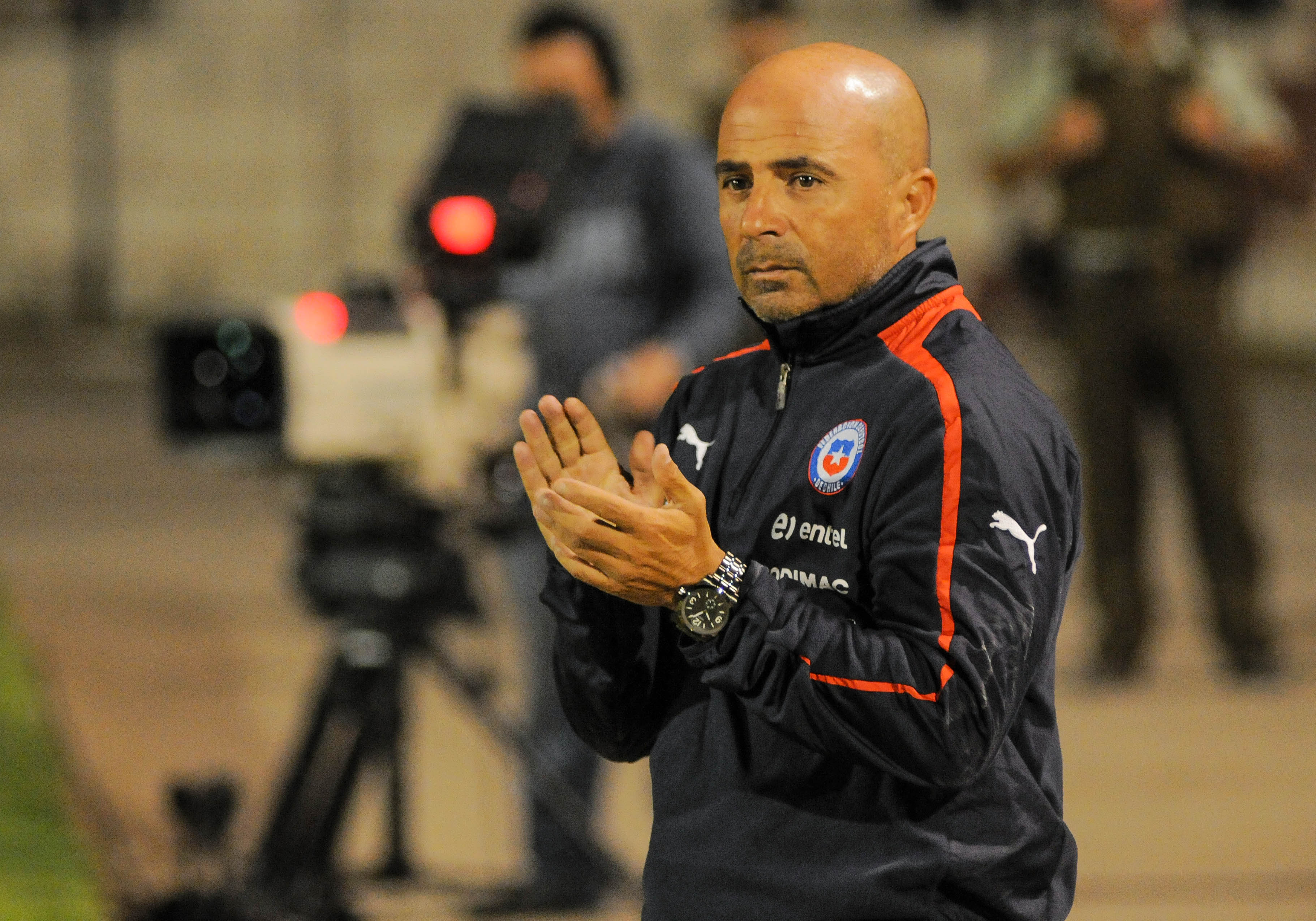 En partido amistoso entre la Selección de Chile y su similar de Senegal en el marco de los encuentros de despedida del antiguo estadio La Portada de La Serena